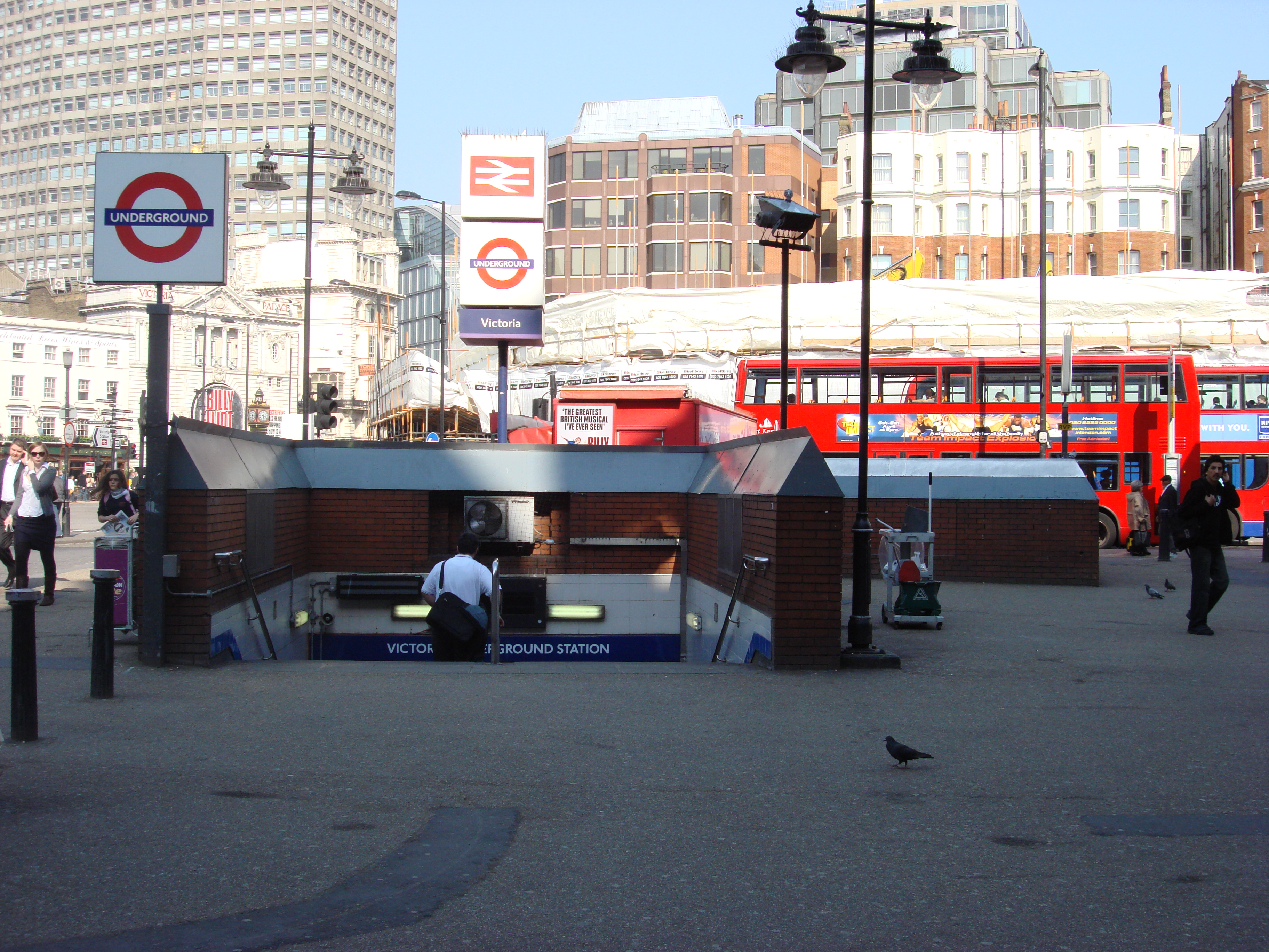 Victoria line entrance at Victoria station